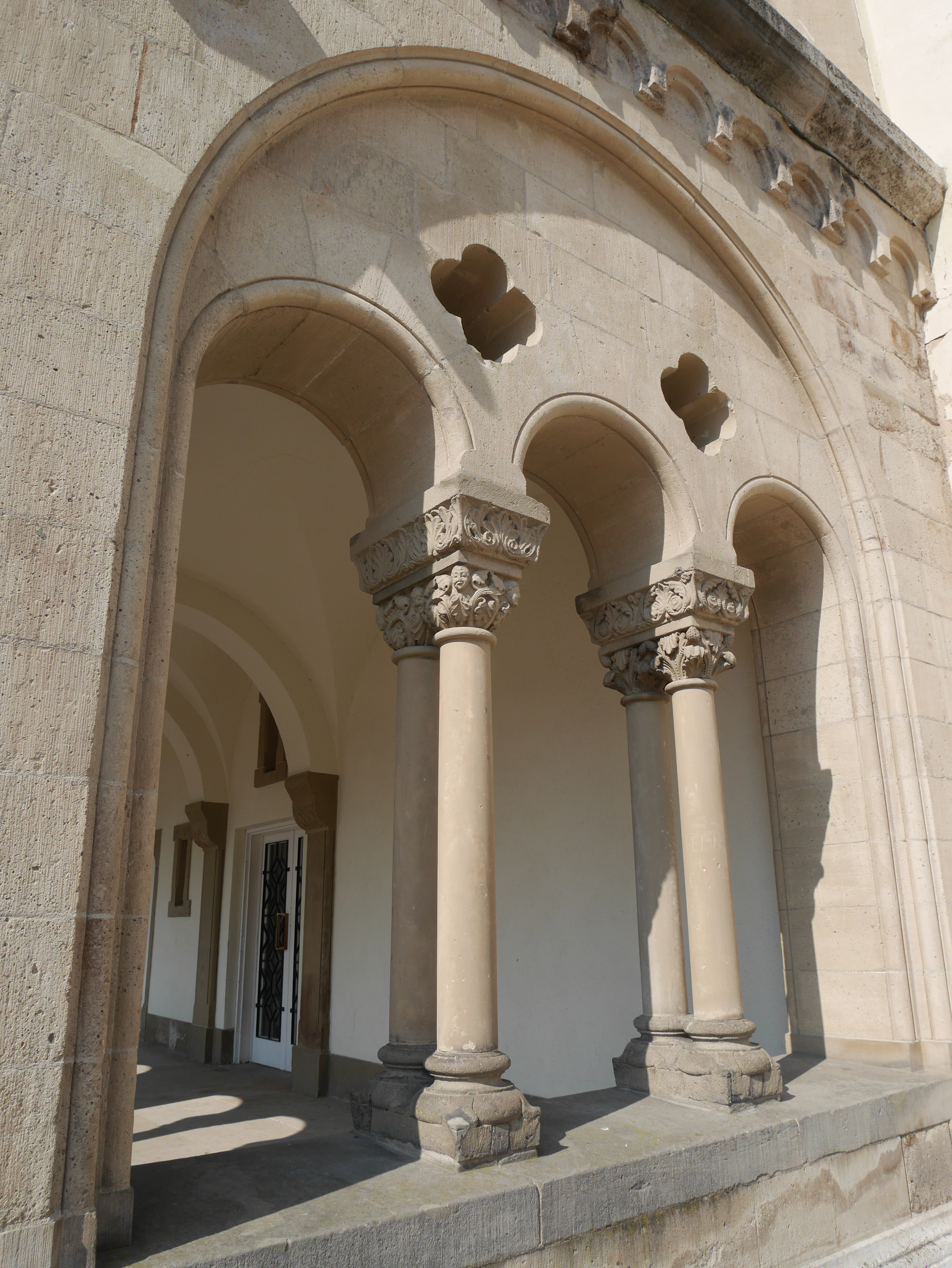 Schloss Bad Homburg vor der Höhe neoromanische Halle Doppelkapitelle romanisch